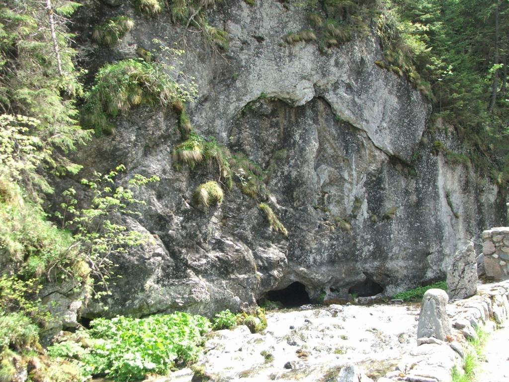 Skała Pisana (Dolina Kościeliska)